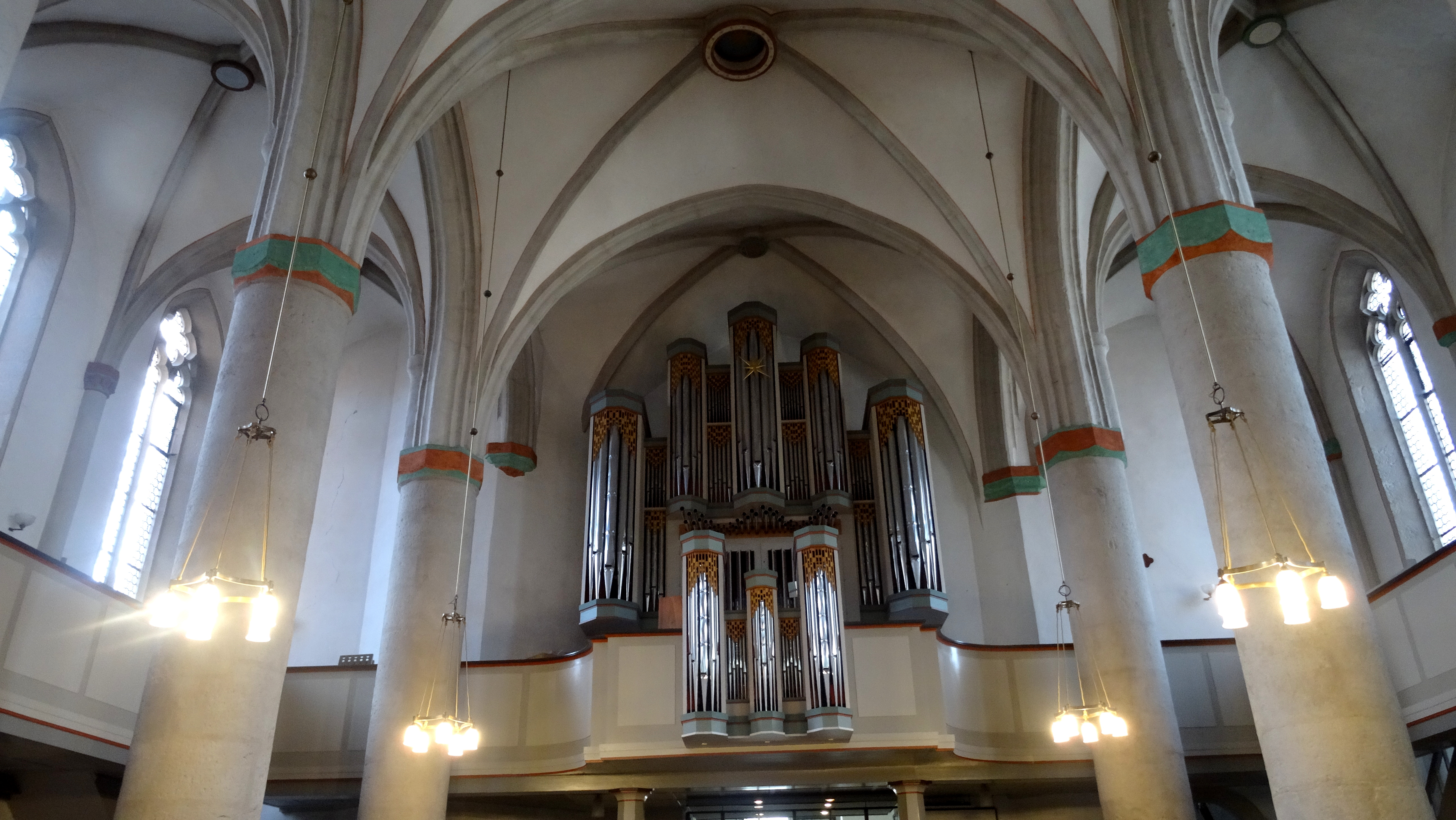 Stadtkirche Bad Wildungen Orgel